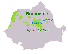 Hongaarse_minderheid_in_Roemenië. Ik heb dit bestand gemaakt met behulp van nl::afbeelding:Hongaars.PNG (bron is PD)